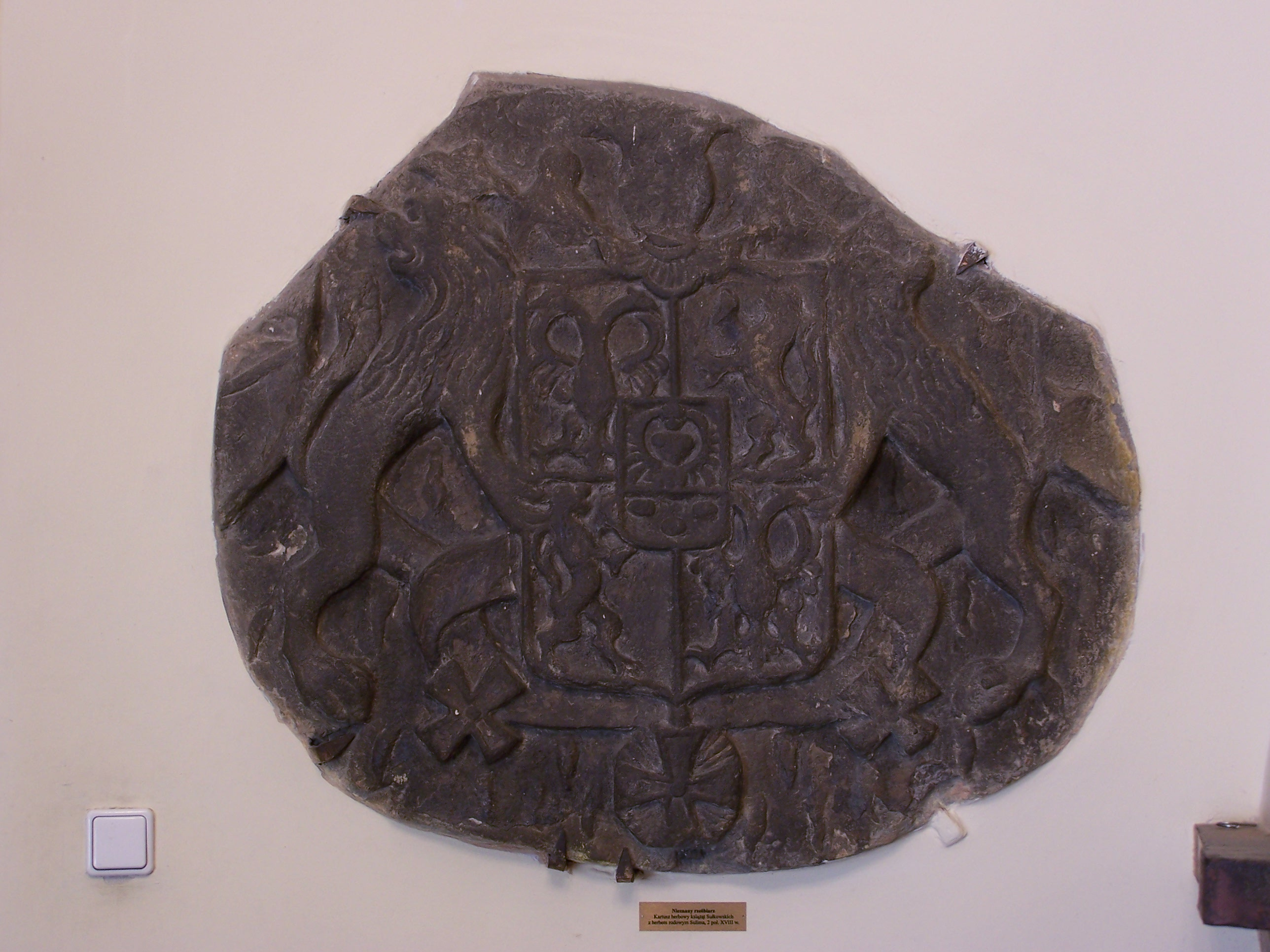 Kartusz herbowy książąt Sułkowskich z herbem rodowym Sulima z 2 poł. XVIII wieku znajdujący się w muzeum na zamku książąt Sułkowskich w Bielsku-Białej